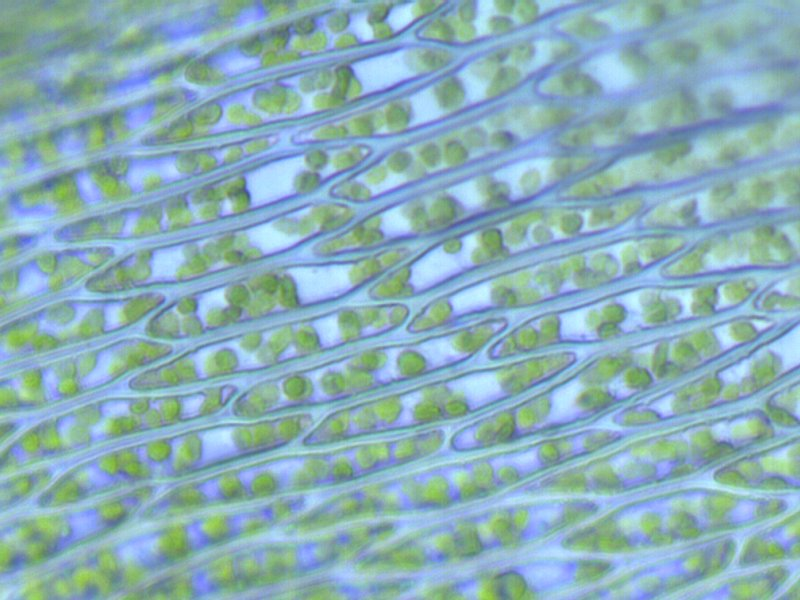 Bäumchen-Leitermoors (Climacium dendroides), Laminazellen bei 400x Vergr., Rostock